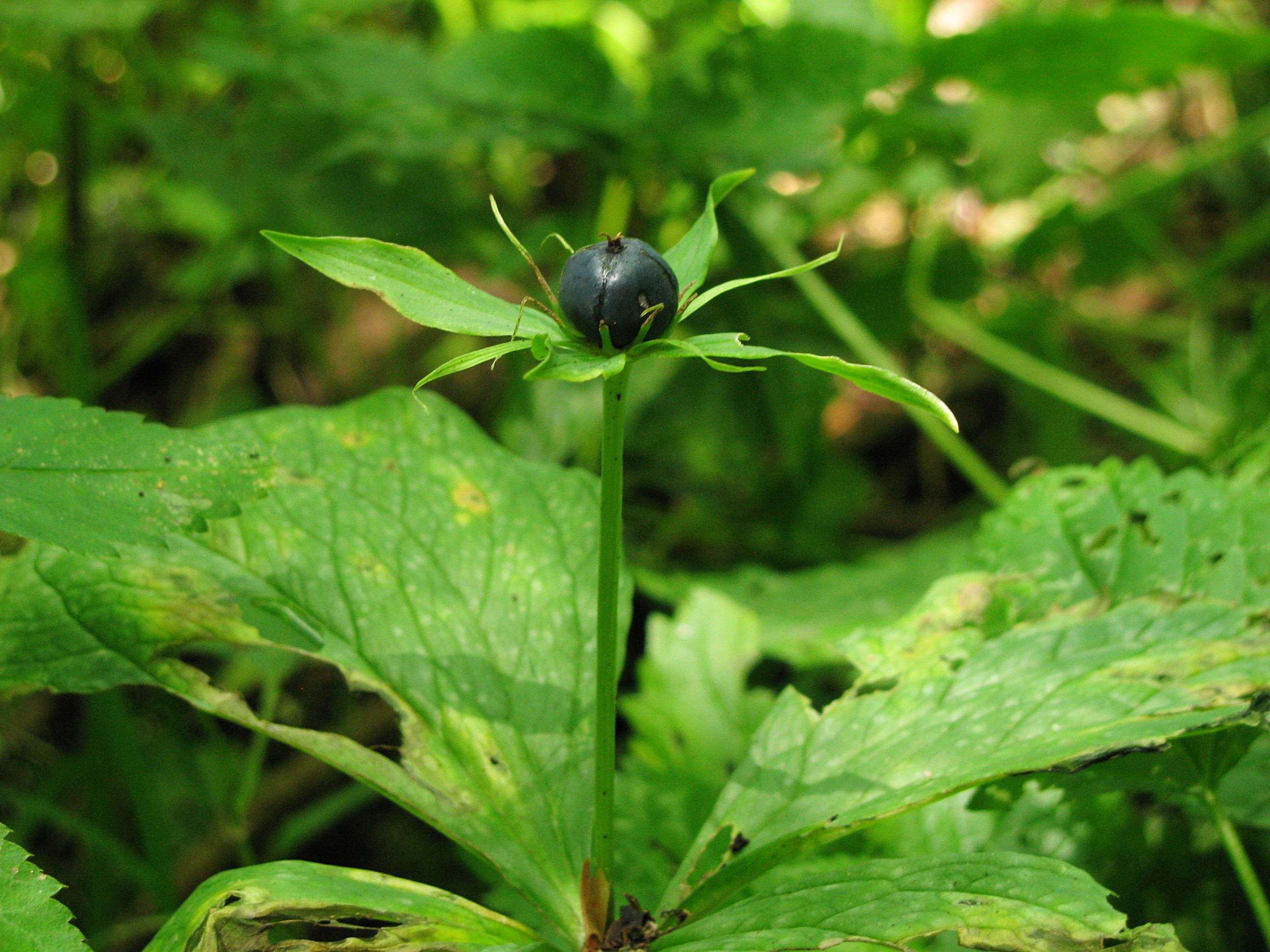 Einbeere beim Burgstall Willenberg